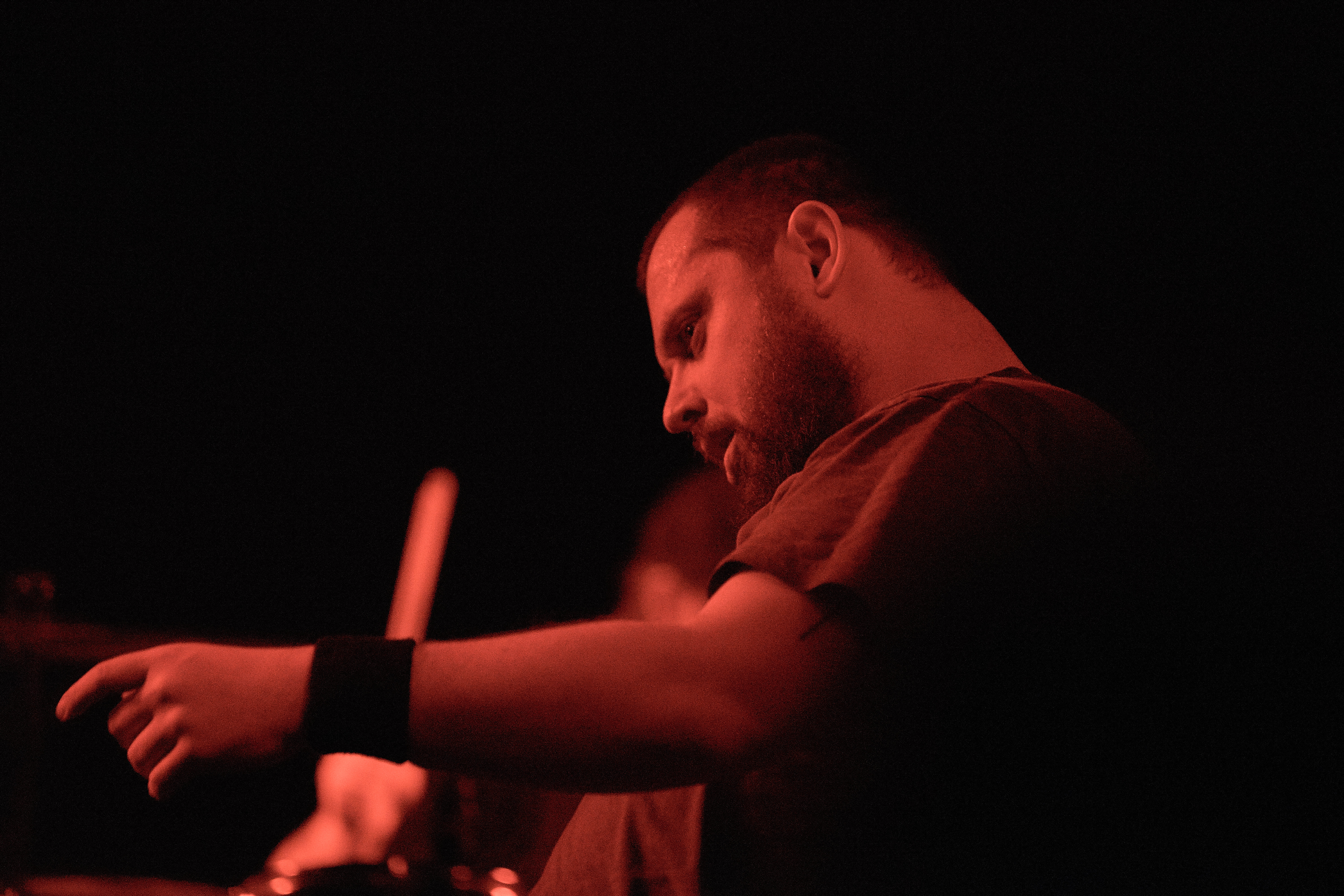 Mannheim based Sludge / Doom band Black Shape of Nexus" live @ Cassiopeia Berlin 2016-01-28